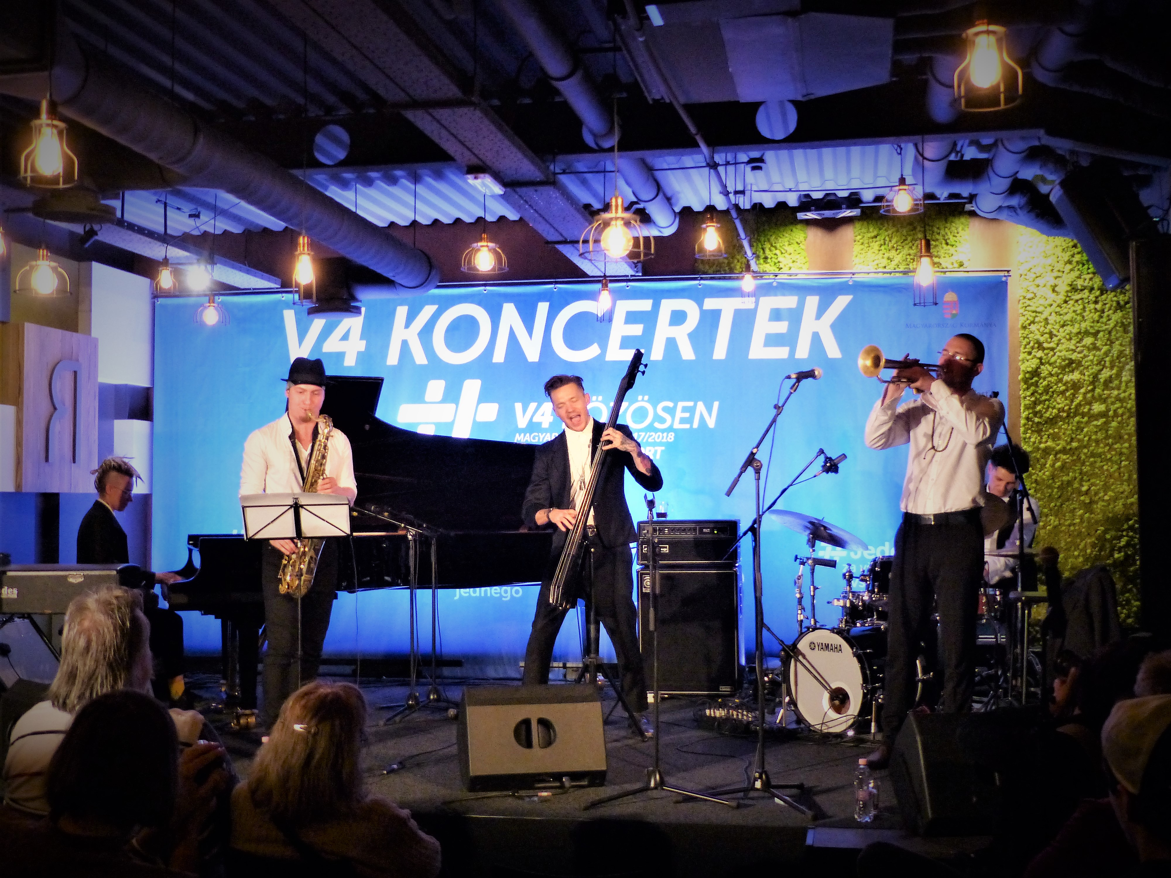 Wojtek Mazolewski Trio. A felvétel 2017. november 3-án pénteken készült a Várkert Bazárban. A V4 koncertek keretében lépett fel a Wojtek Mazolewski Trio (PL Jazz). Double Bass Wojtek Mazolewski, drums Qba Janicki, piano Joanna Duda, tenor saxophone Marek Pospieszalski, trumpet: Oskar Török